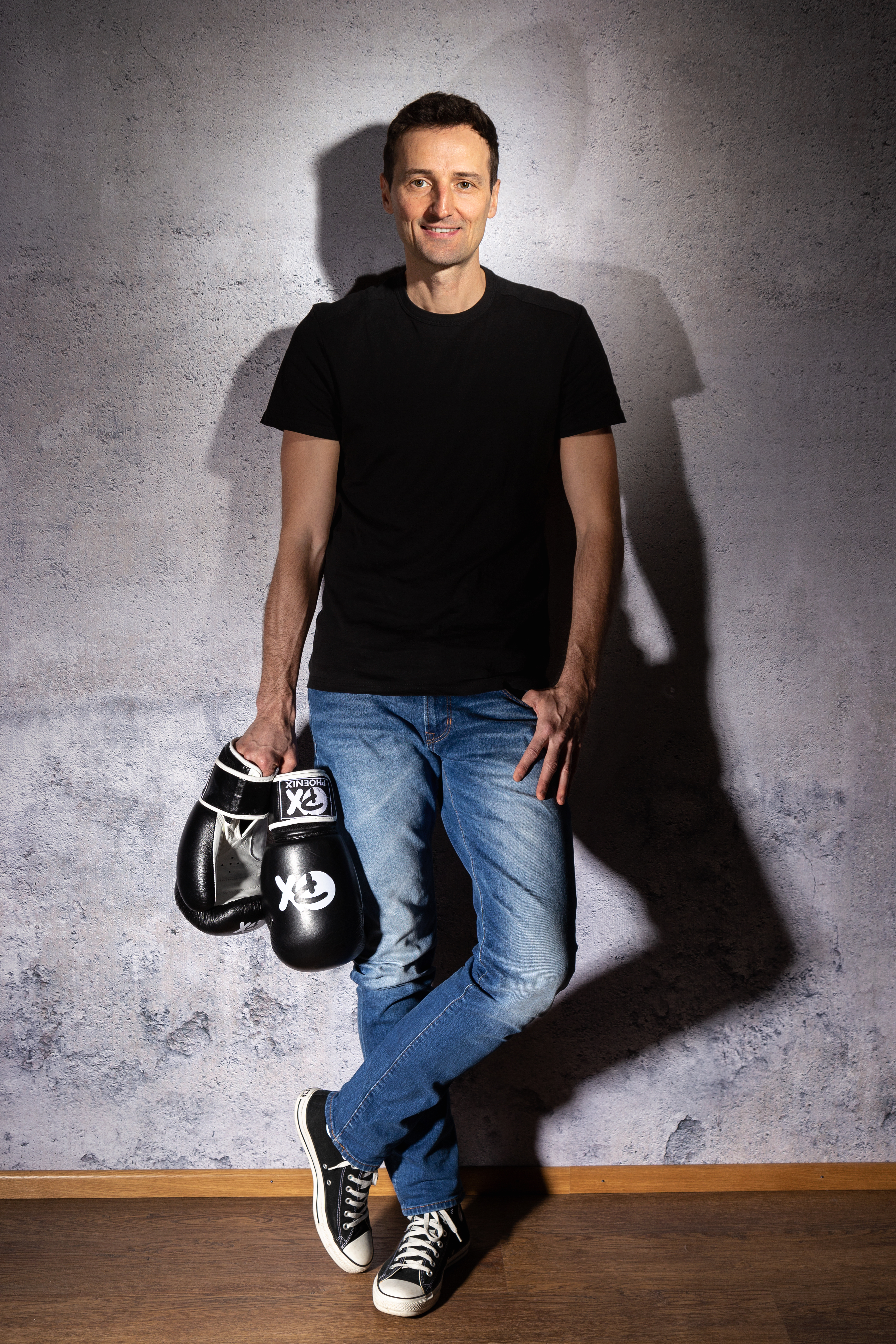 Mentalcoach - 13facher Kickboxing Weltmeister